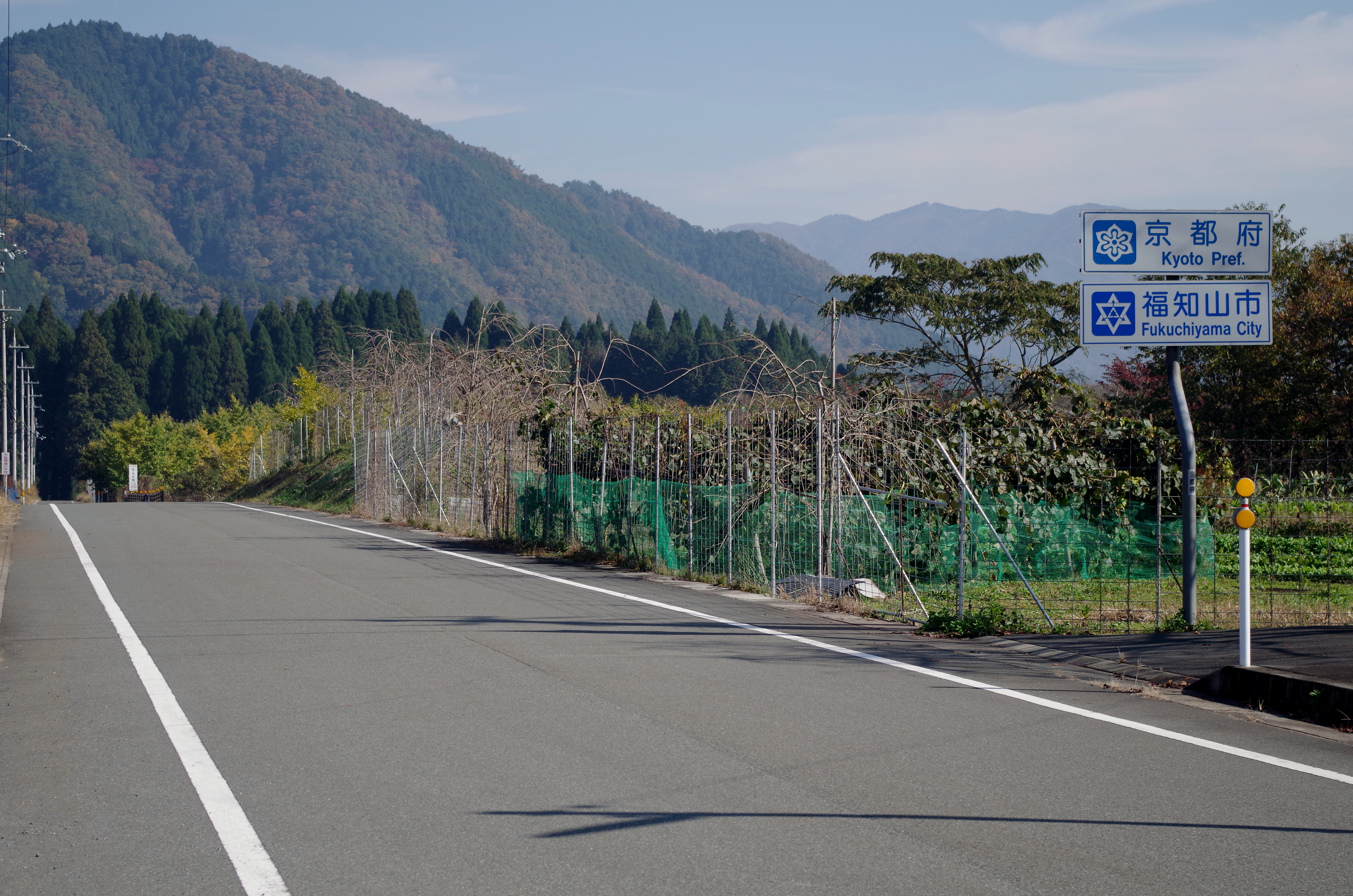 兵庫県道・京都府道63号山東大江線 府県境 兵庫県朝来市山東町 京都府福知山市夜久野町